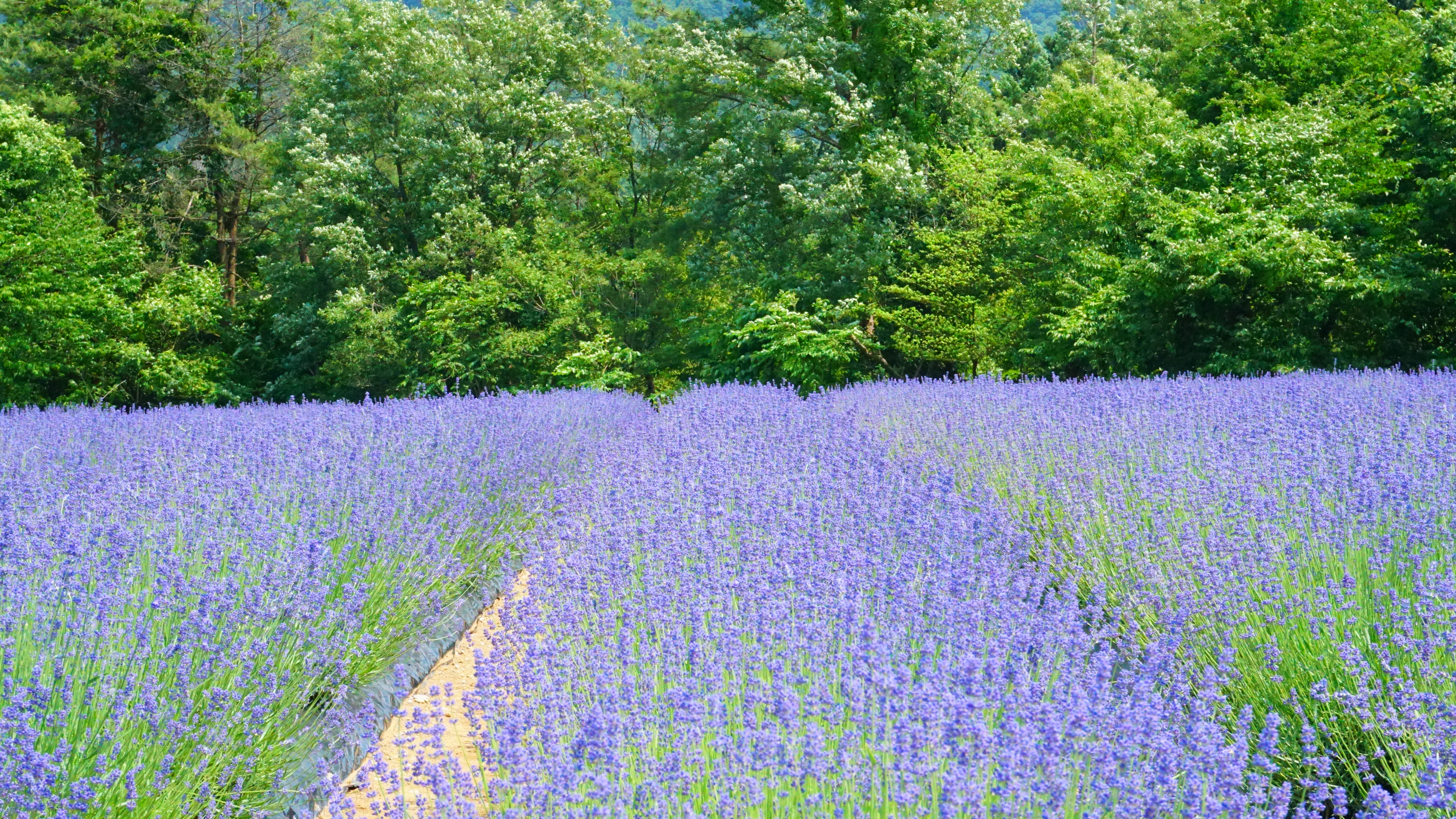 美郷町ラベンダー園にて（秋田県仙北郡）